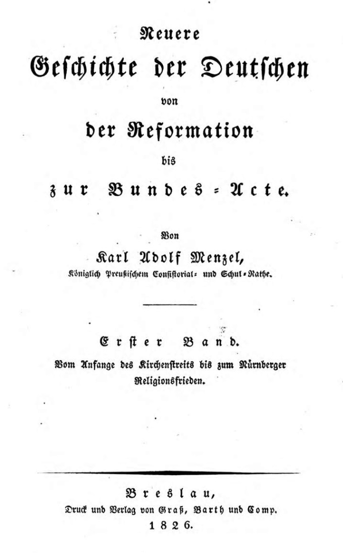 Karl Adolf Menzel: Neuere Geschichte der Deutschen von der Reformation bis zur Bundes-Acte. Erster Band, Breslau 1826, Titelseite